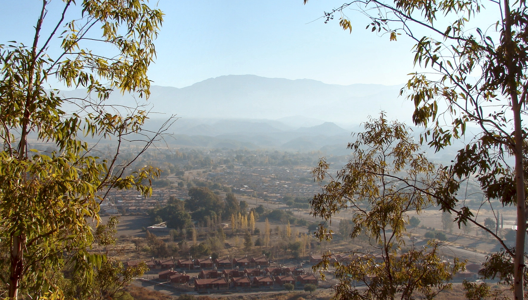 Las Heras Department, Mendoza Province, Argentina